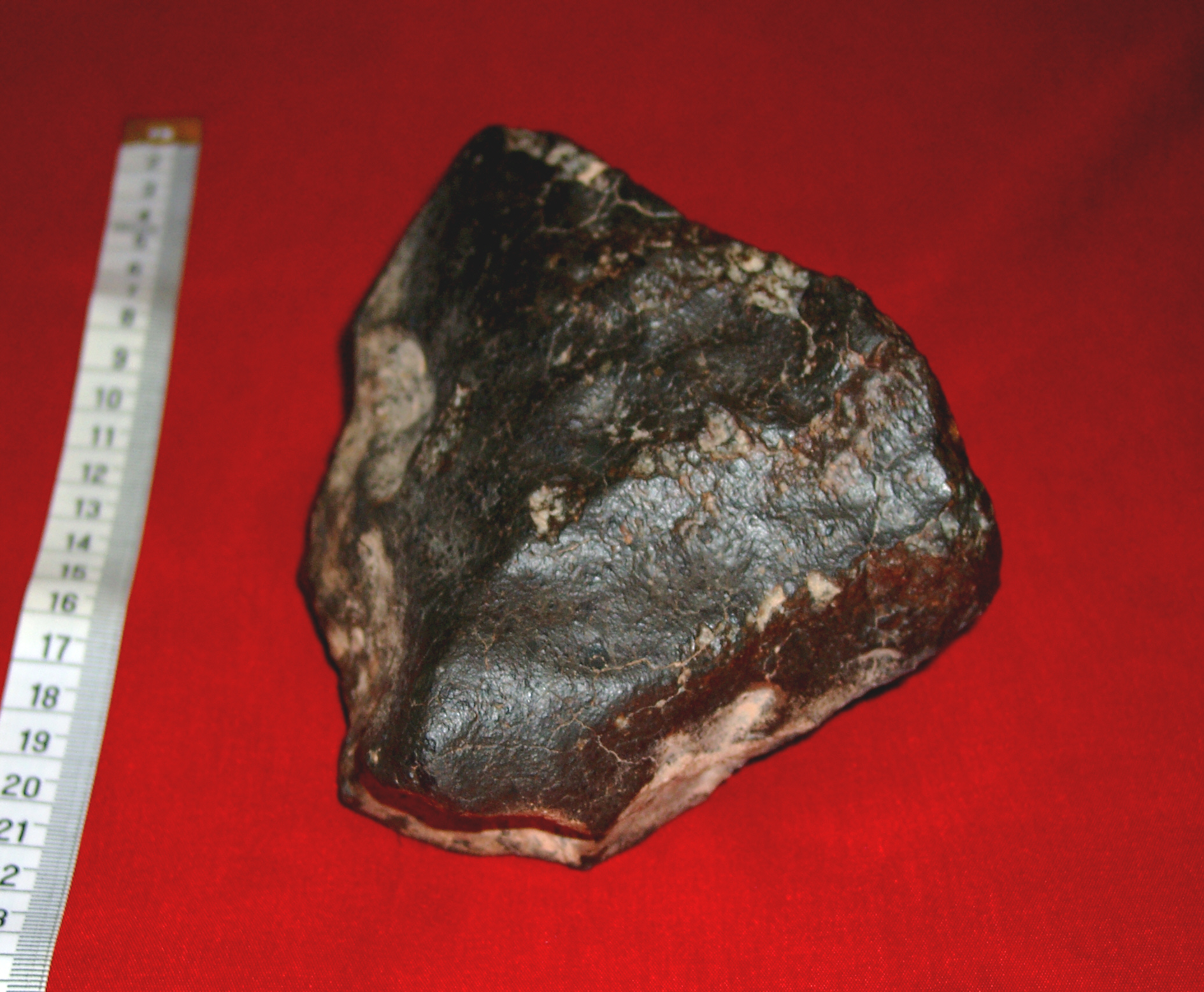 1,5 Kilogramm schwere Hauptmasse des L-Chondriten NWA3009